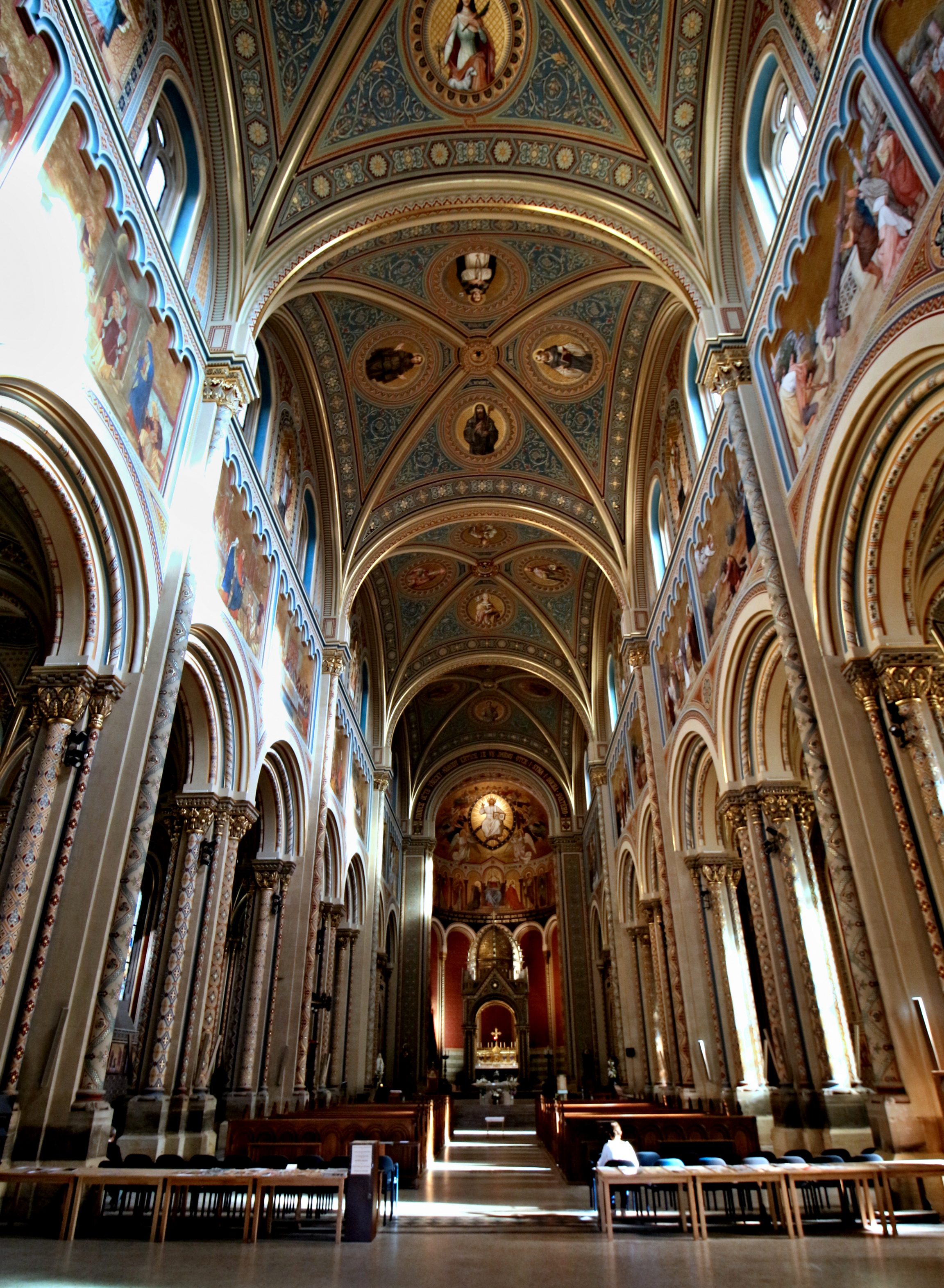 Karlínský kostel svatých Cyrila a Metoděje